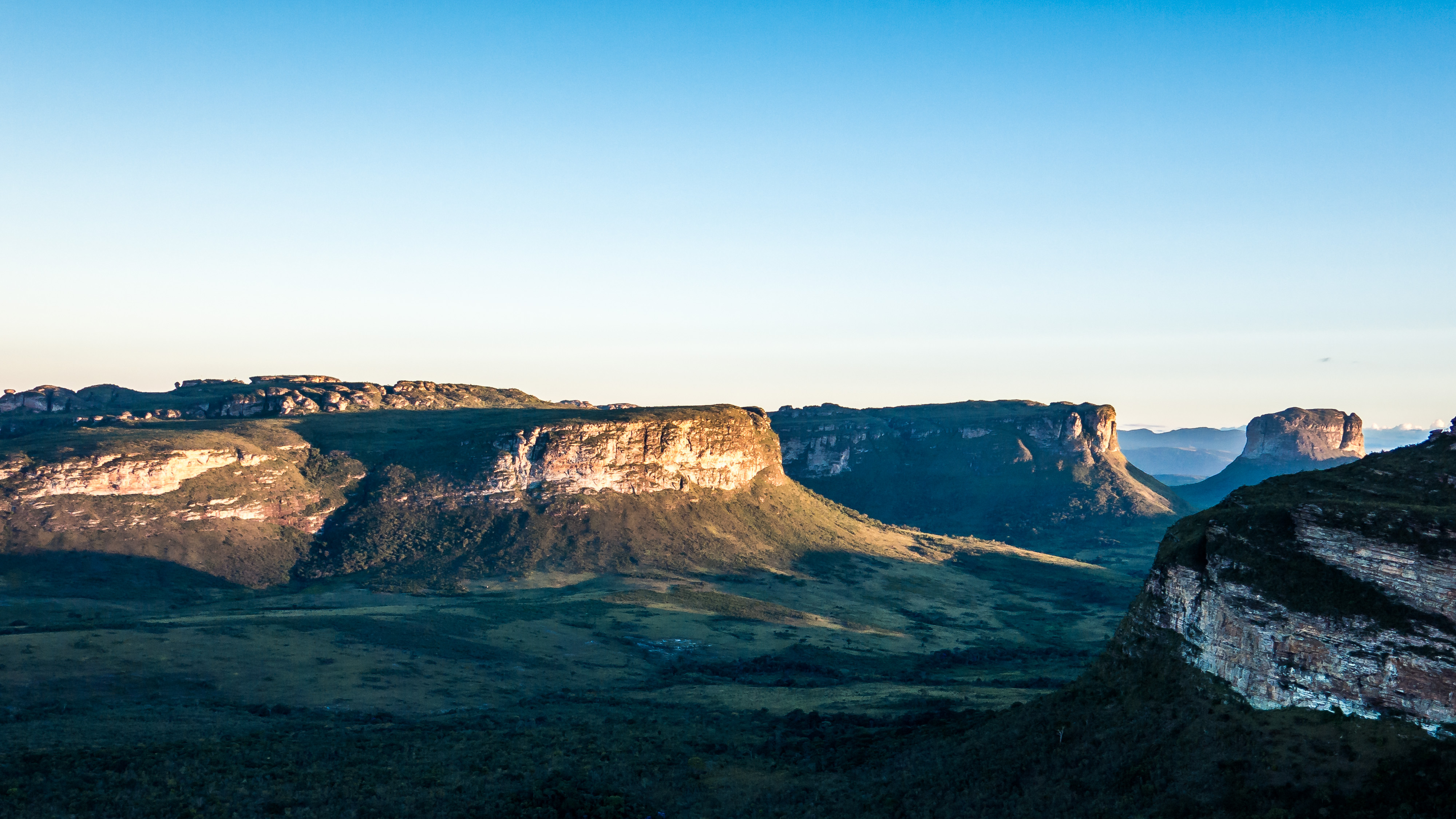 Foto da outra parte da Chapada Diamantina tirada do morro do pai inacio